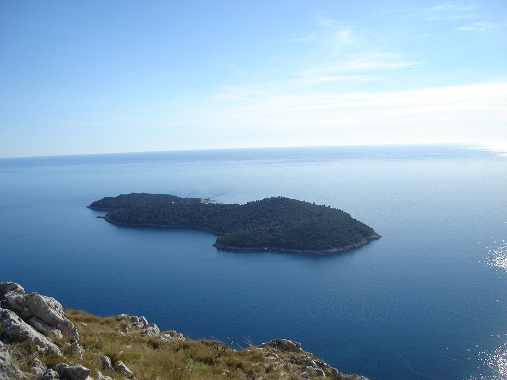 Island Lokrum - Dubrovnik